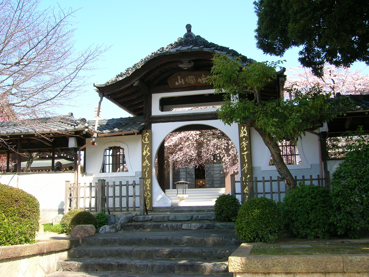 Ajioka-san Kōjaku-in temple Loc: Showa-ku, Nagoya city, Aichi Prefecture, Japan 味岡山 香積院 撮影場所 愛知県名古屋市昭和区